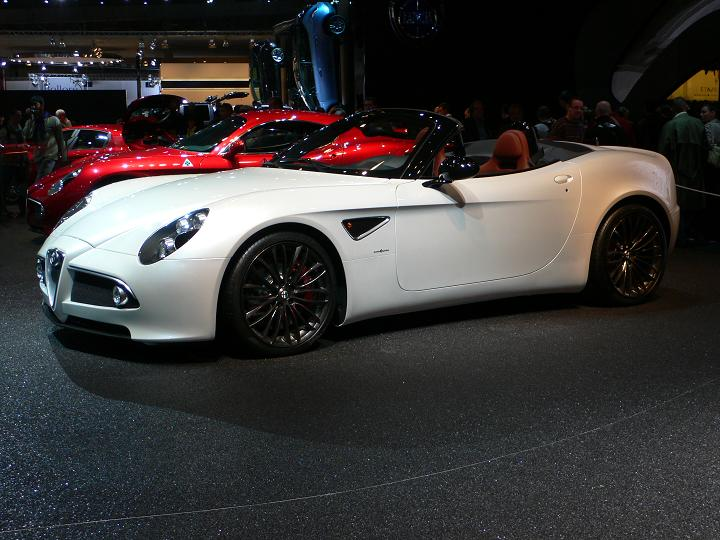 Alfa Romeo 8C Cabriolet